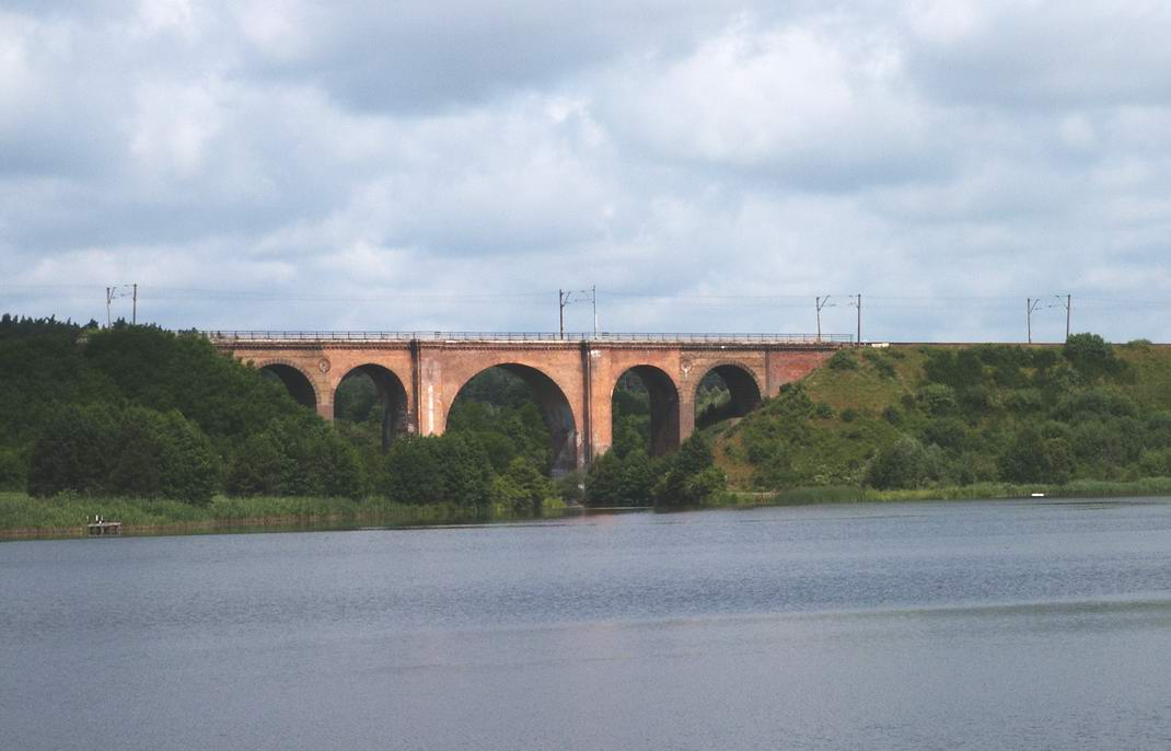 Bridge over Wda near Swiecie (Poland) Pl: Most kolejowy na rzece Wda w okolicach Świecia